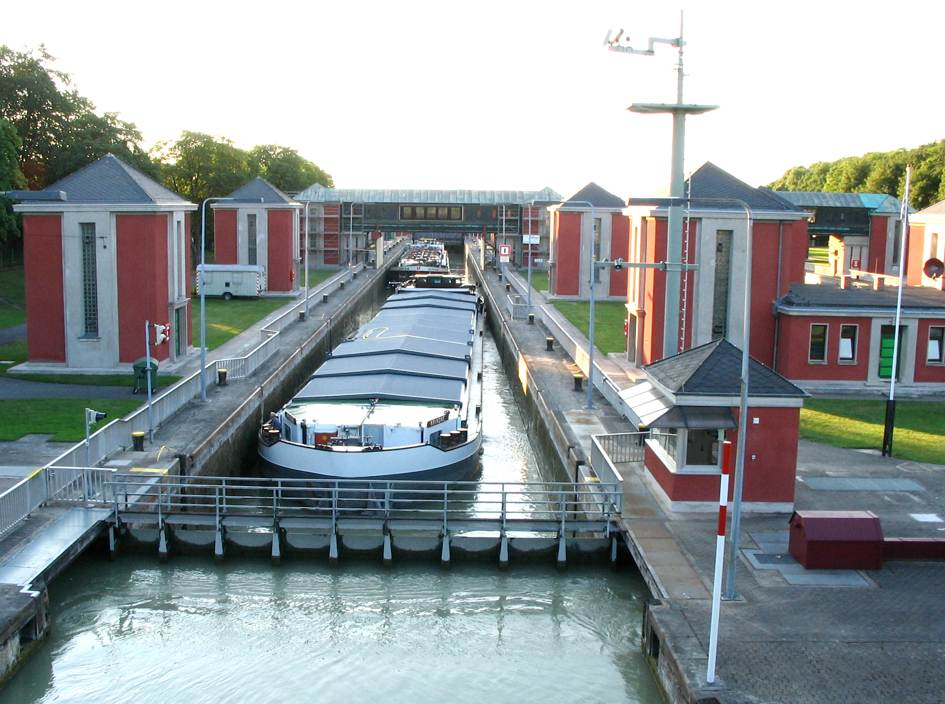 Hindenburgschleuse Hannover-Anderten - eine der zwei Schleusenkammern